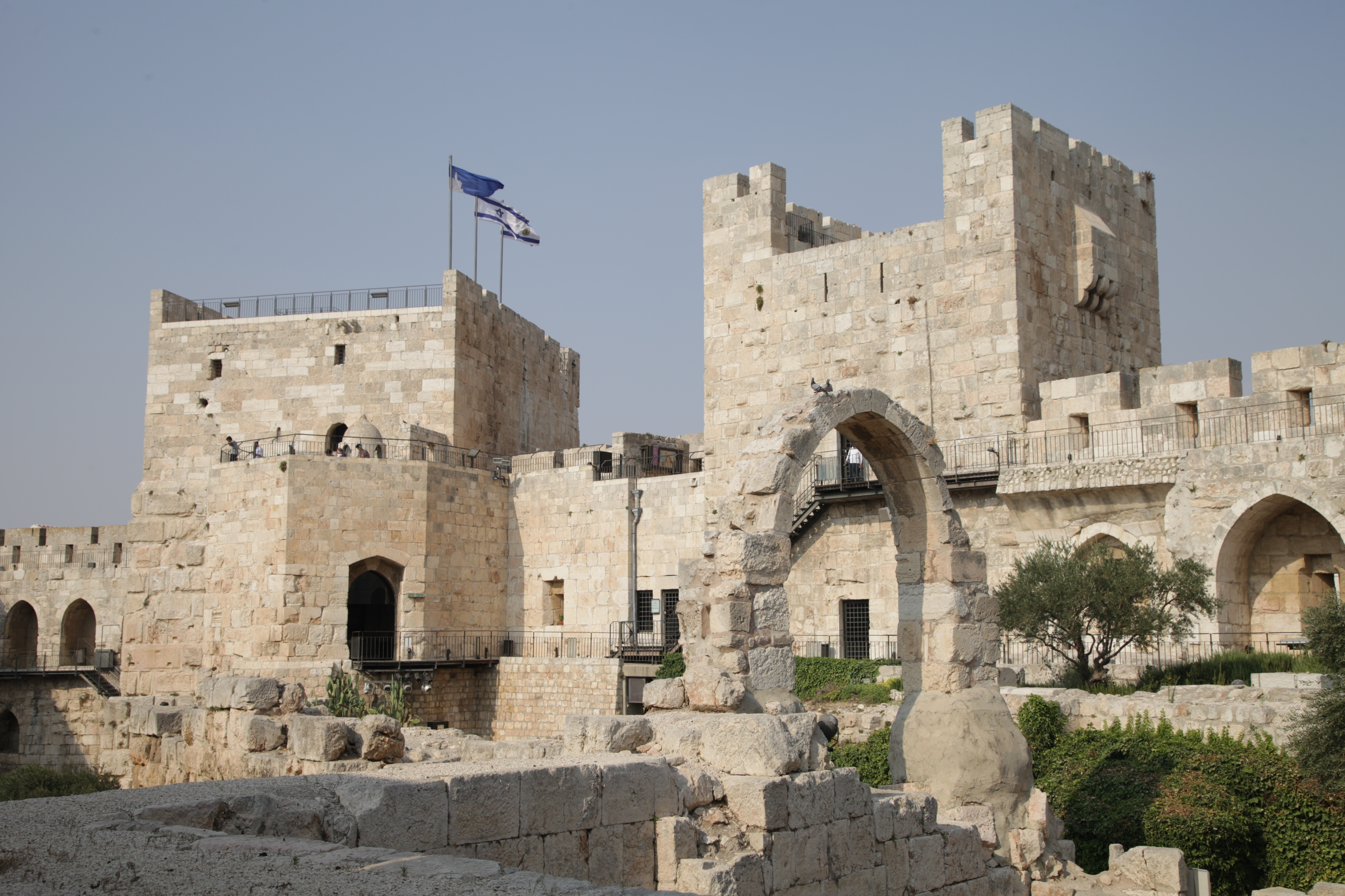 La citadelle de Jérusalem. Jerusalem 07/2012